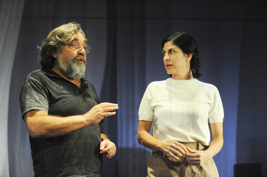 יבגני אריה ואפרת בן צור - חזרות של יונה ונער 2011